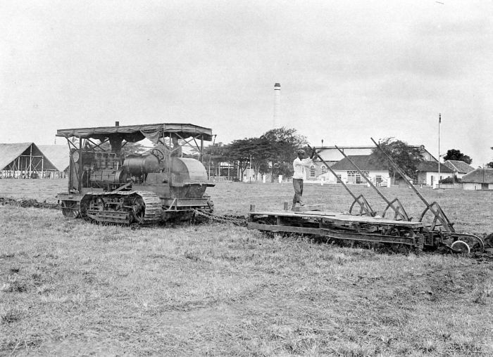 Repronegatief. Eggen (ploegen?), verstelbaar met rupsbandtractor, Sempalwadak